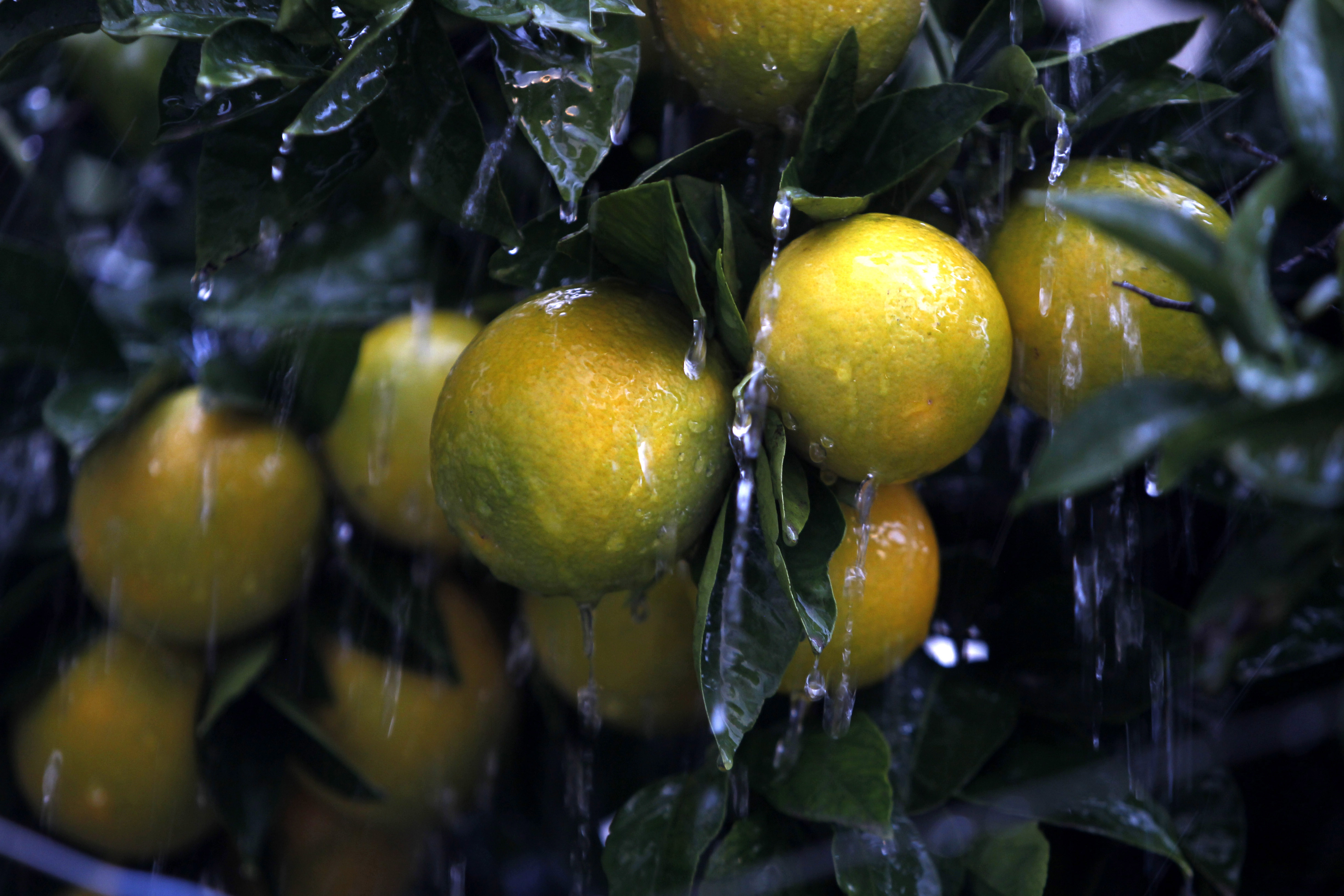 شجرة البرتقال في الشتاء